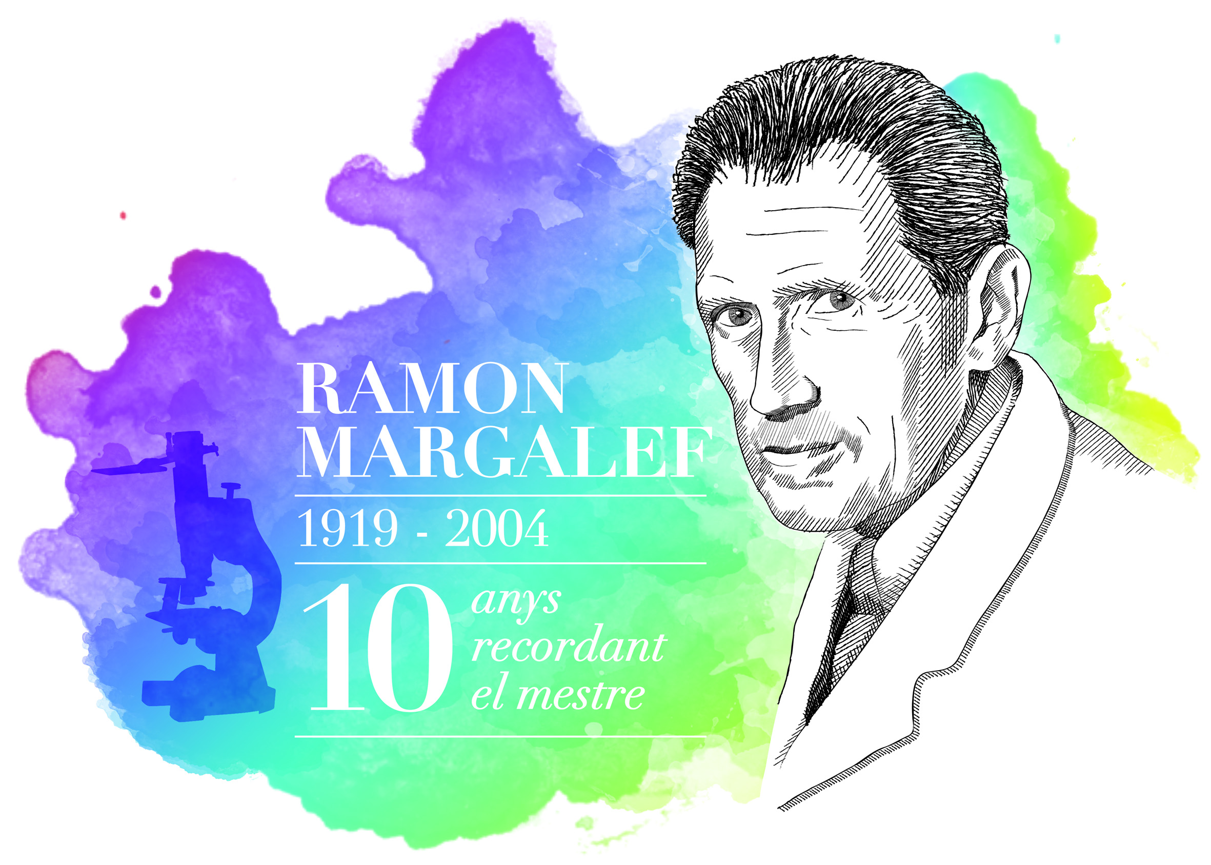 Banner dels actes commemoratius dels 10 anys de la mort del Dr. Margalef